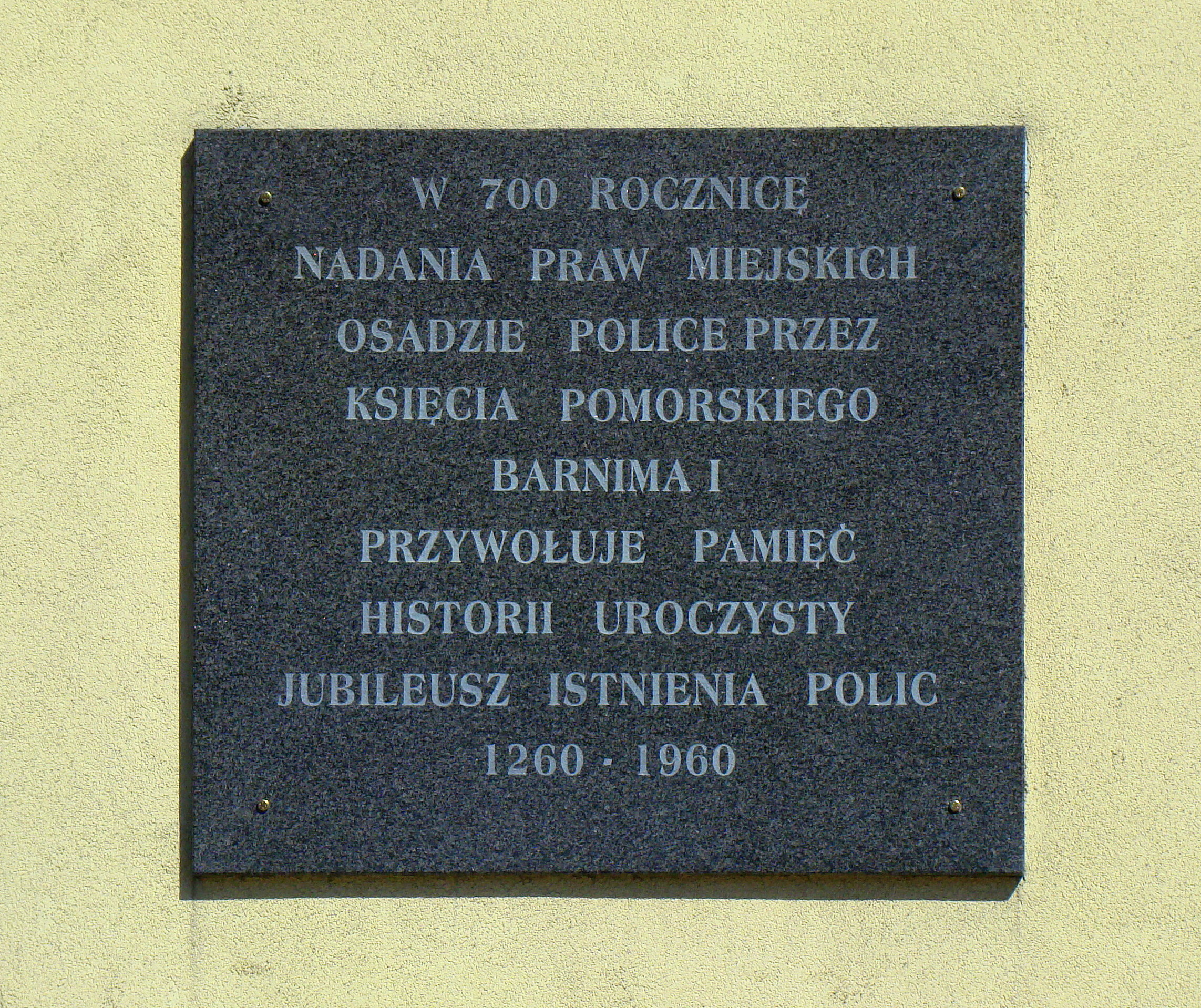 Pamiątkowa tablica, Rynek Starego Miasta w Policach (Police, Województwo zachodniopomorskie), Polska